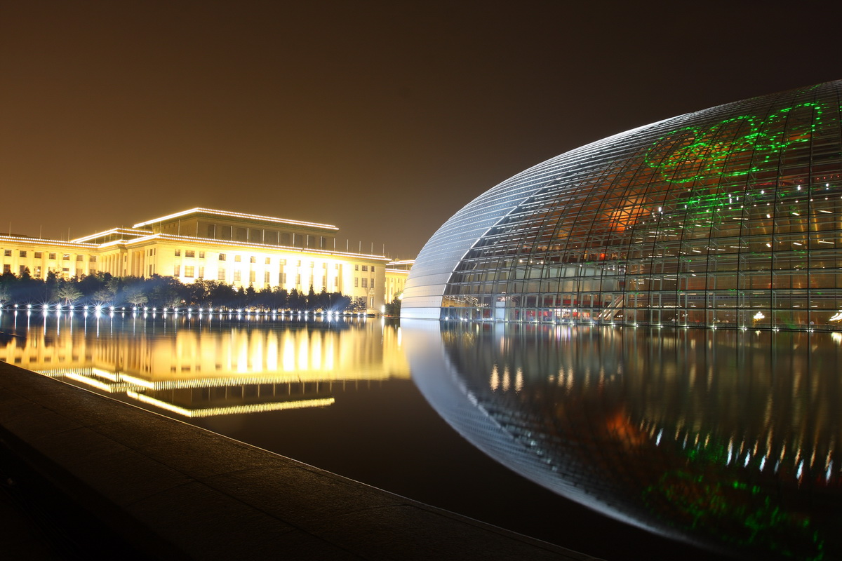 国家大剧院